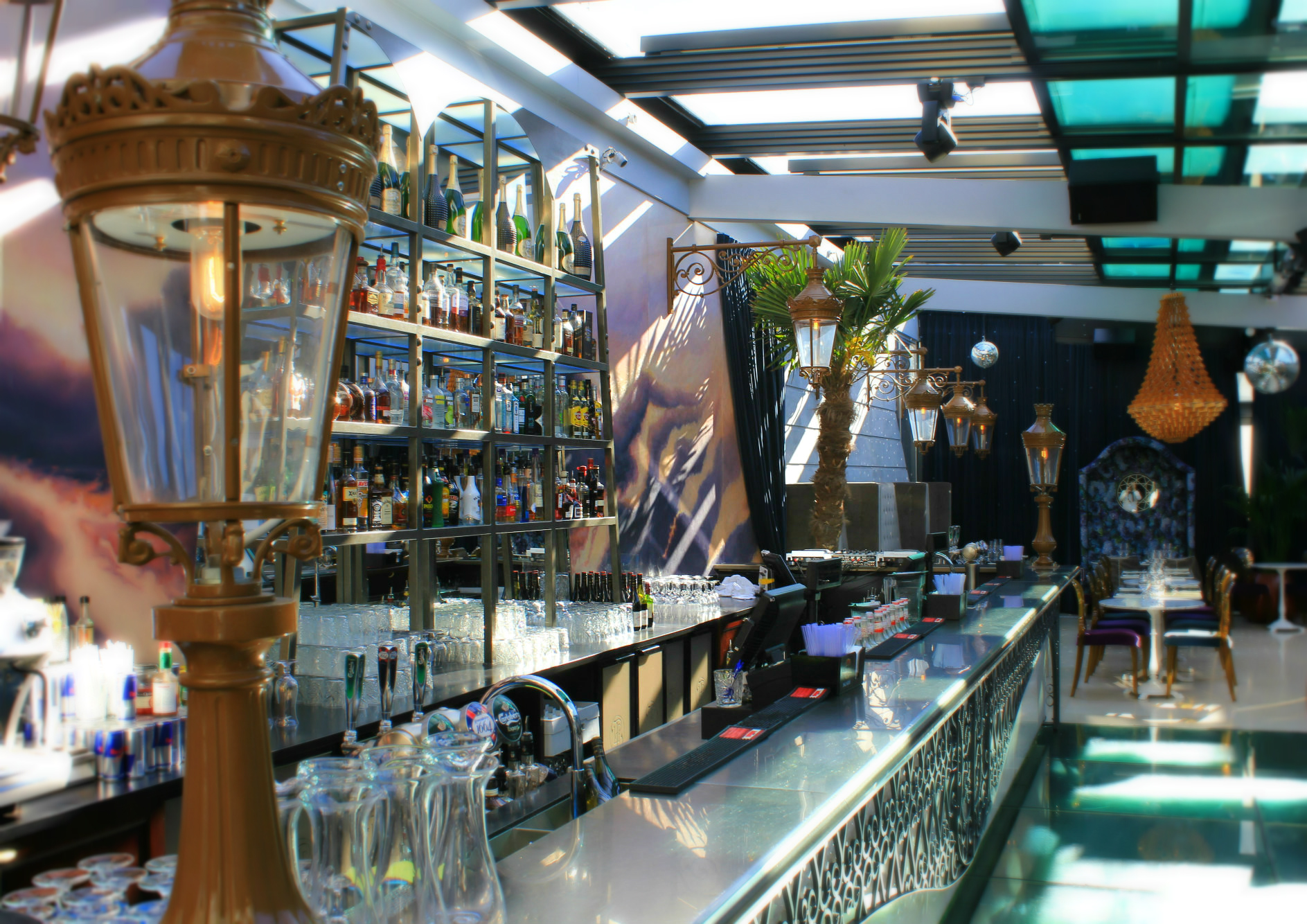 Terrassen på Le Pain Français Bistro på Kungsportsavenyen 7.